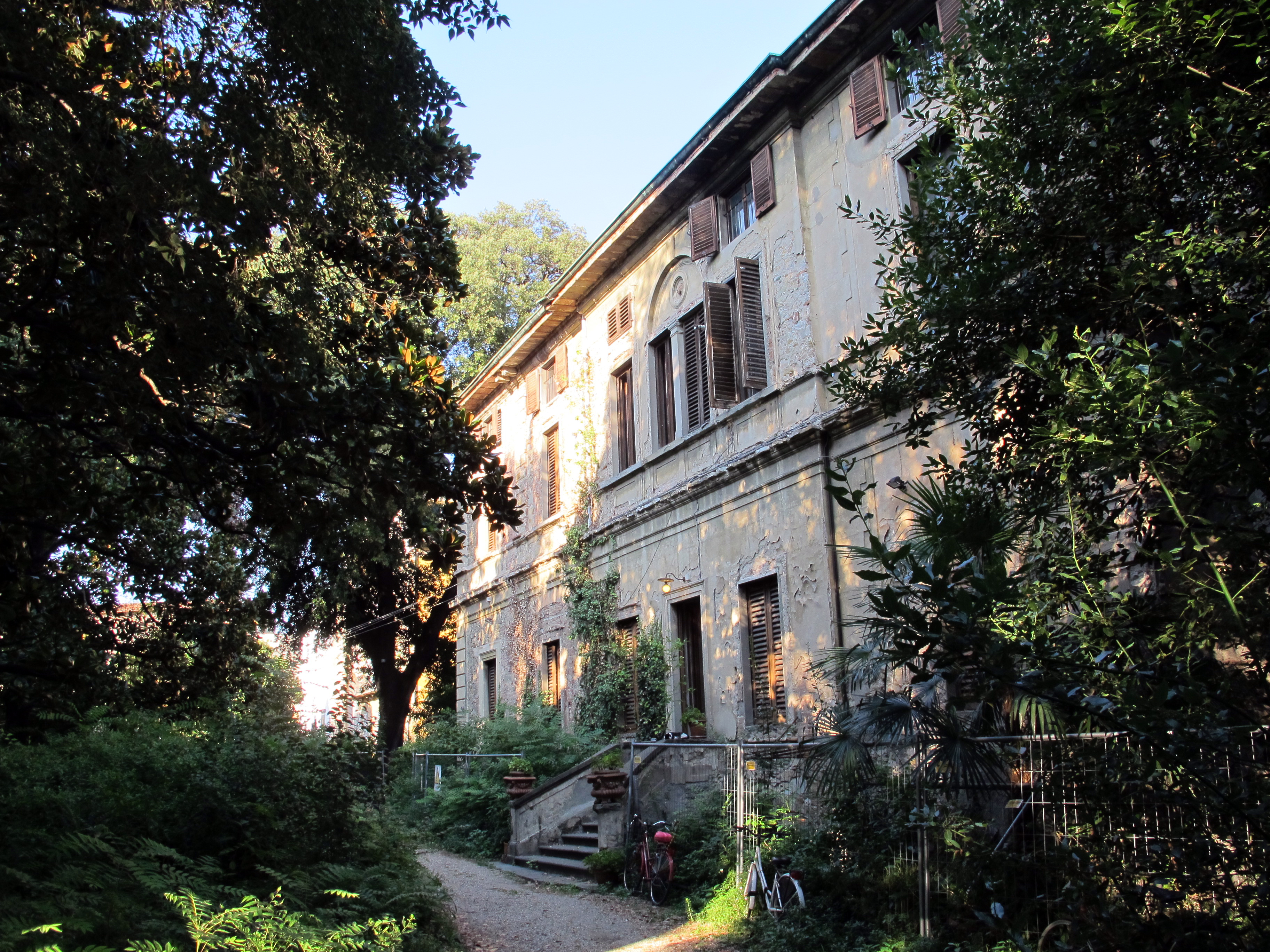 Firenze